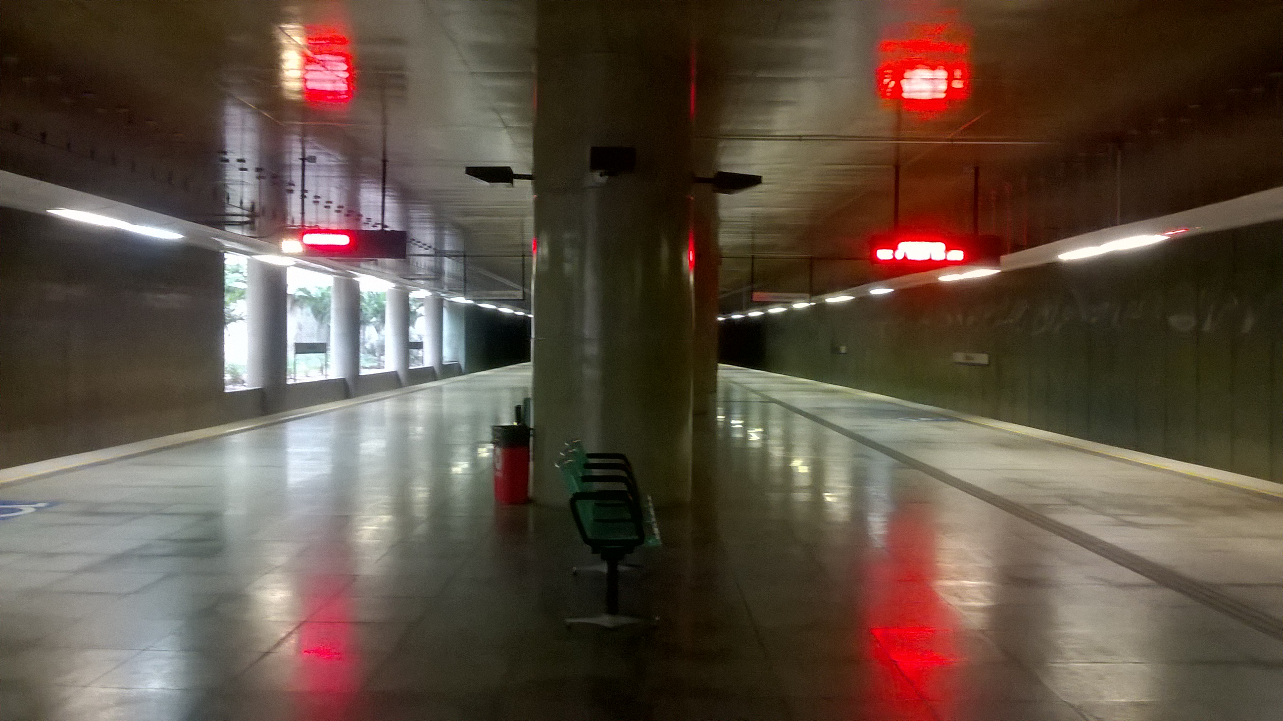 Plataforma da estação Benfica pertencente a Linha Sul do Metrô de Fortaleza